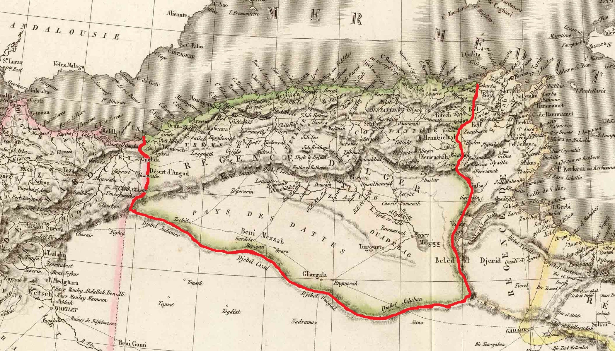 Carte de la Régence d'Alger avant l'invasion française